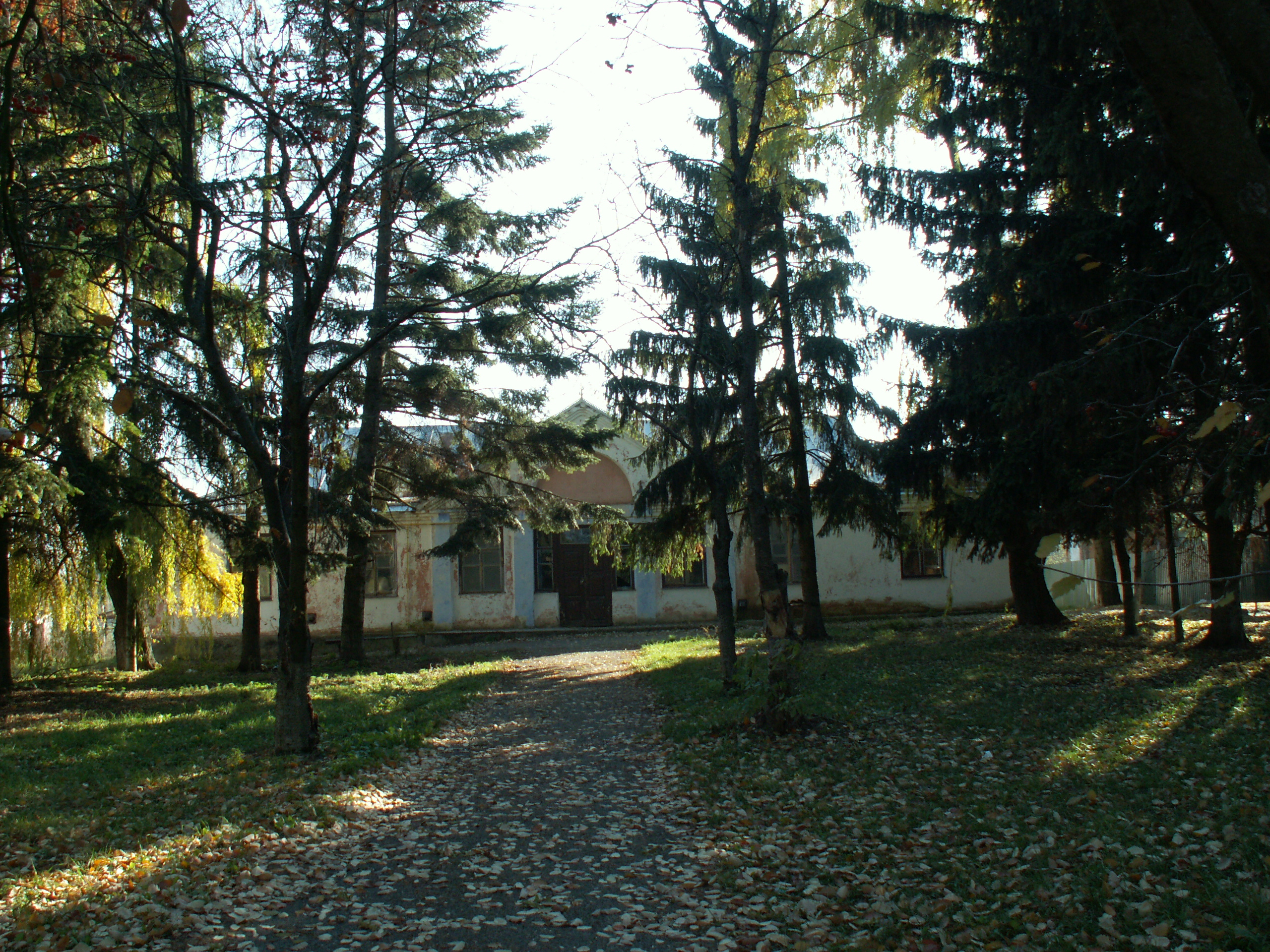 Будинок колишньої колгоспної контори